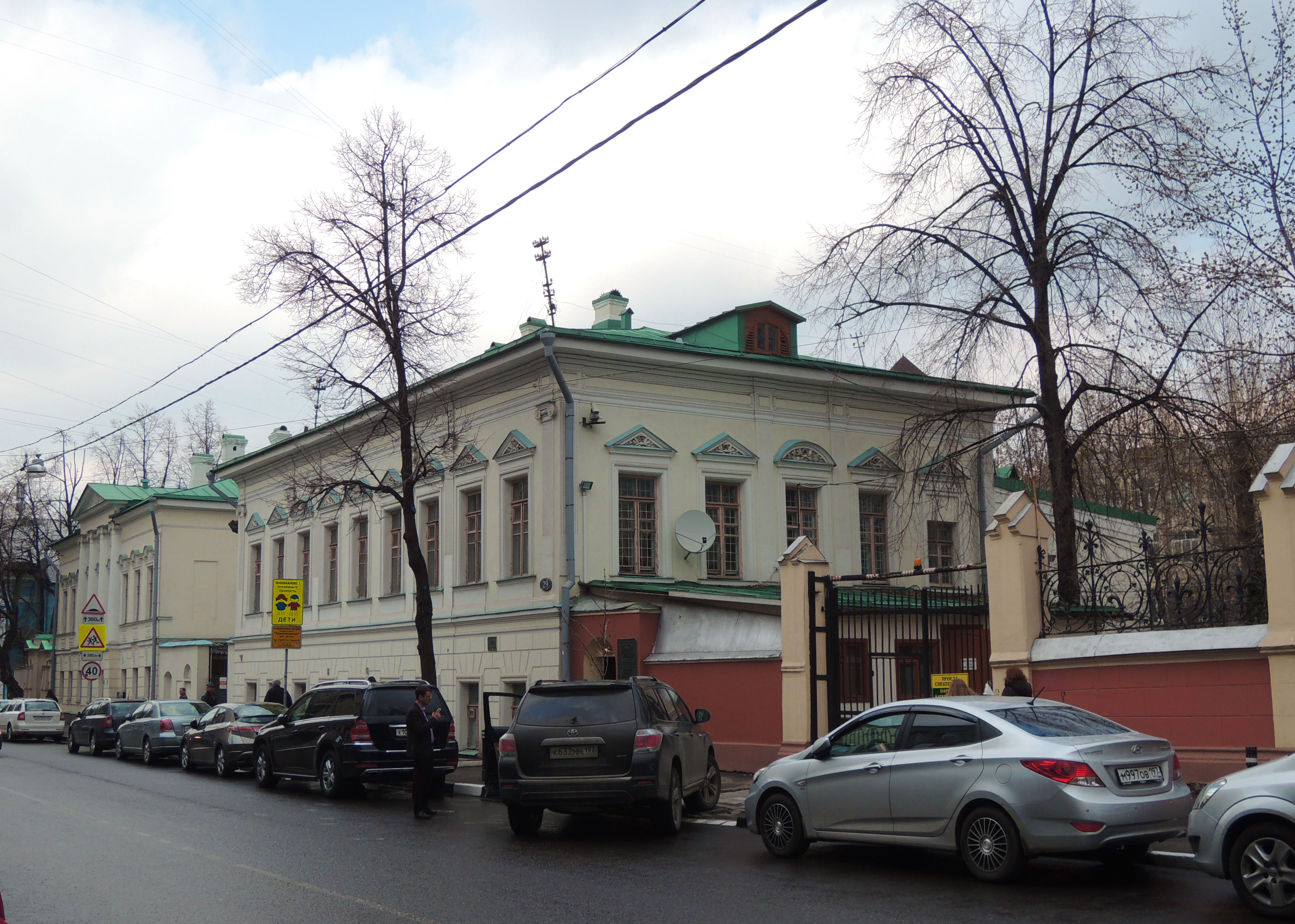 ул. Бахрушина